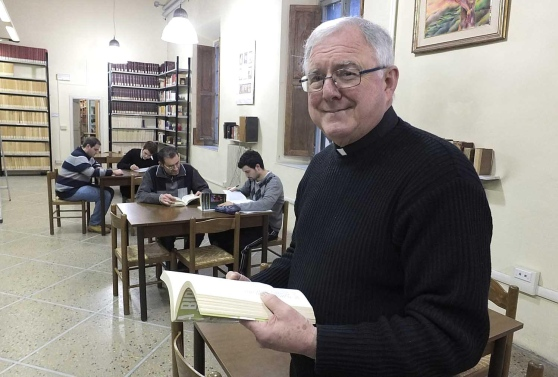 Don Roberto nella sala di lettura della Biblioteca Cathariniana di Pisa